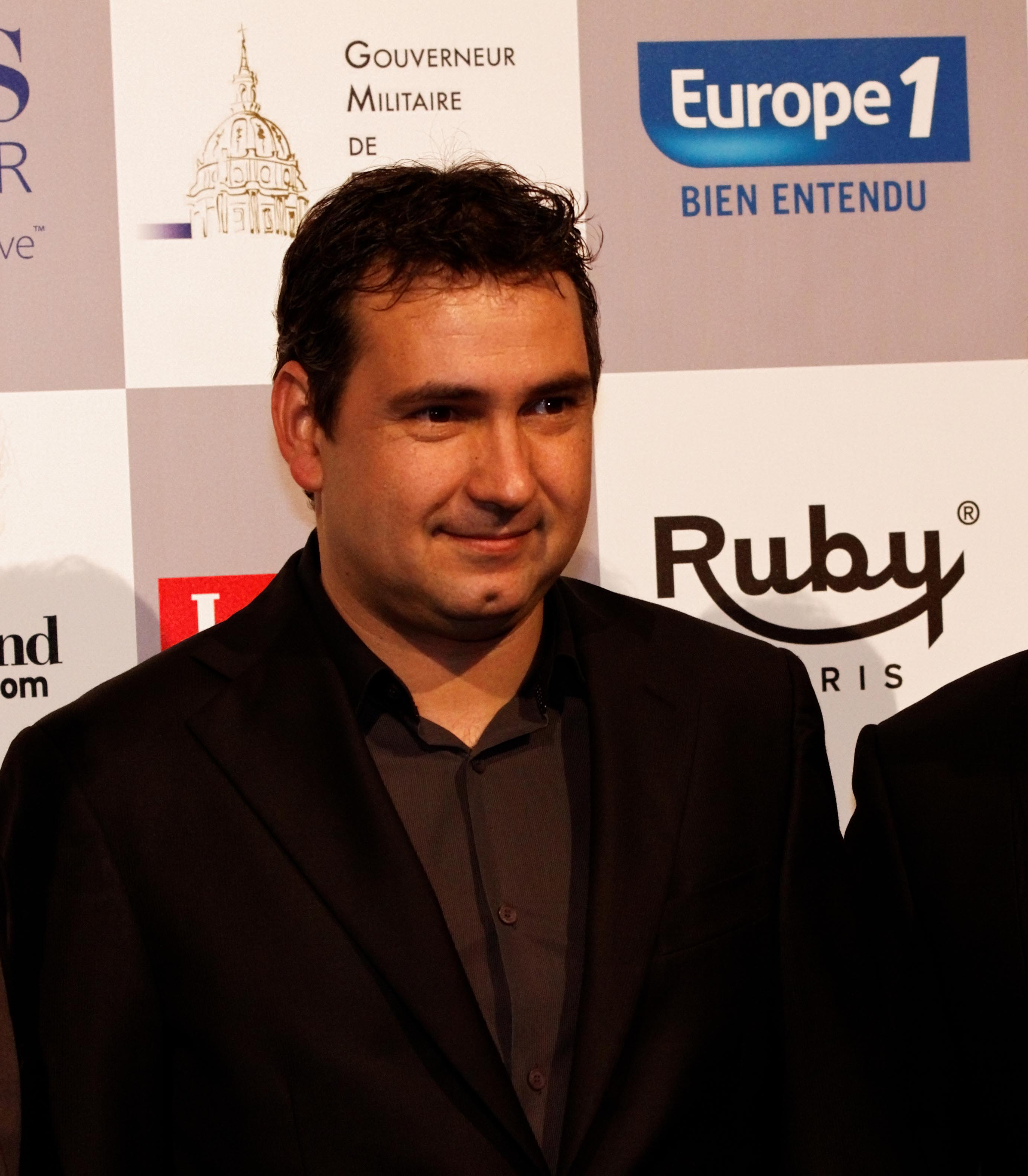 Daniel Elena en 2012.